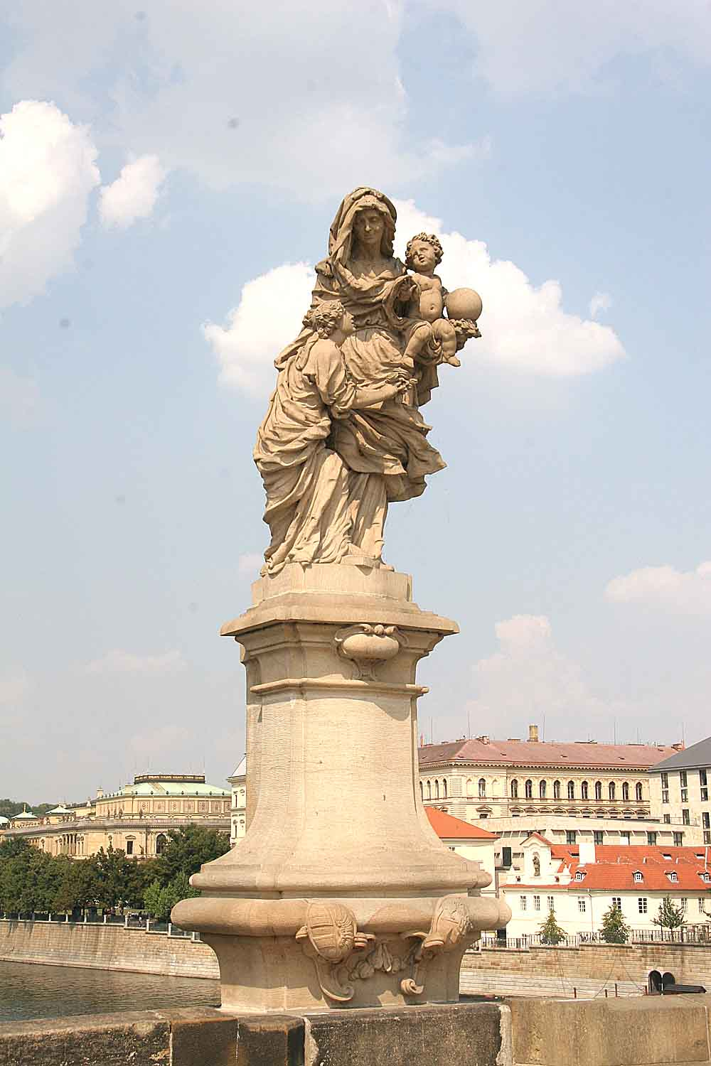 Sousoší Svatá Anna Samatřetí na Karlově mostě